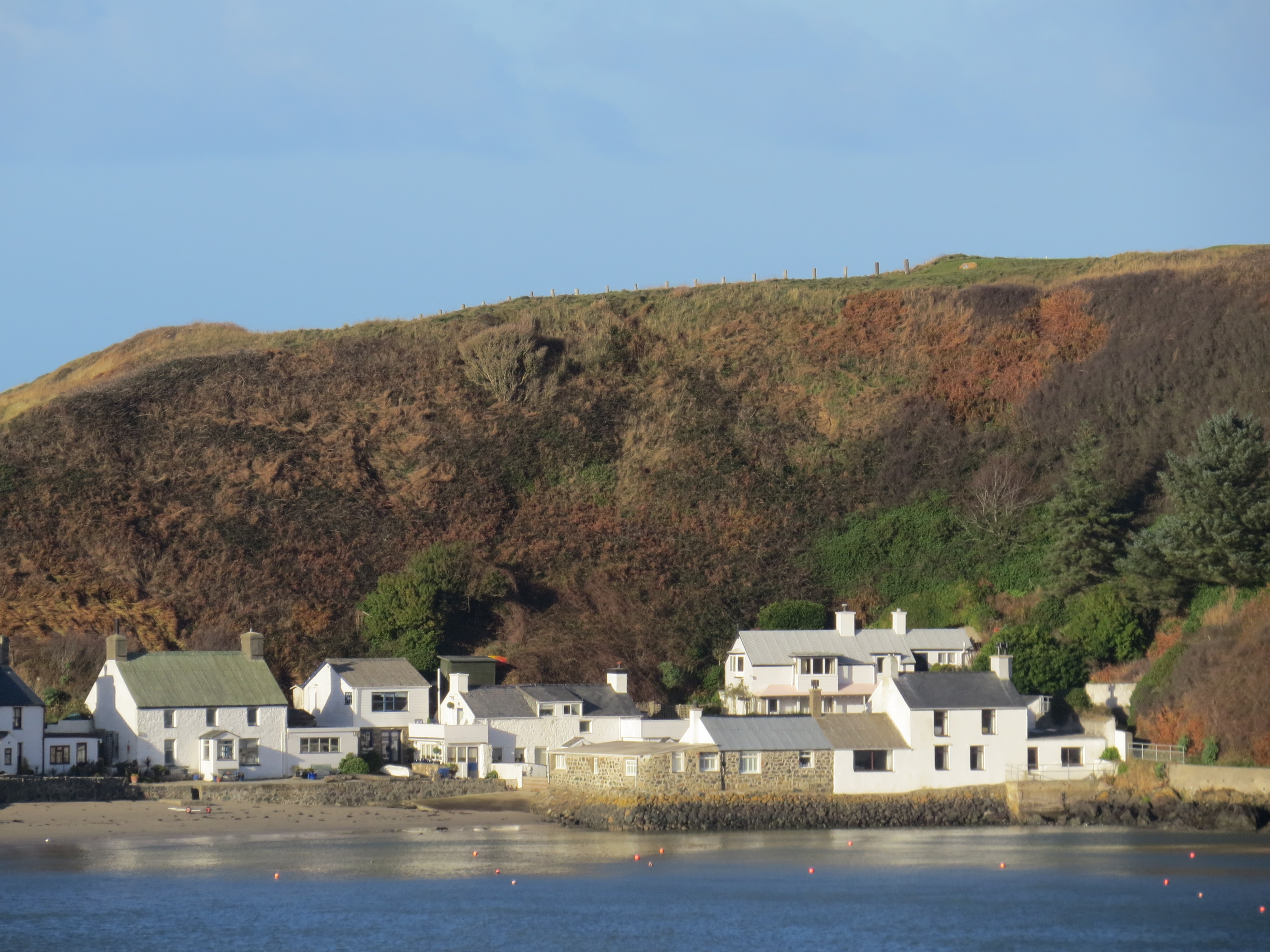 Porth Dinllaen o faes parcio Morfa Nefyn